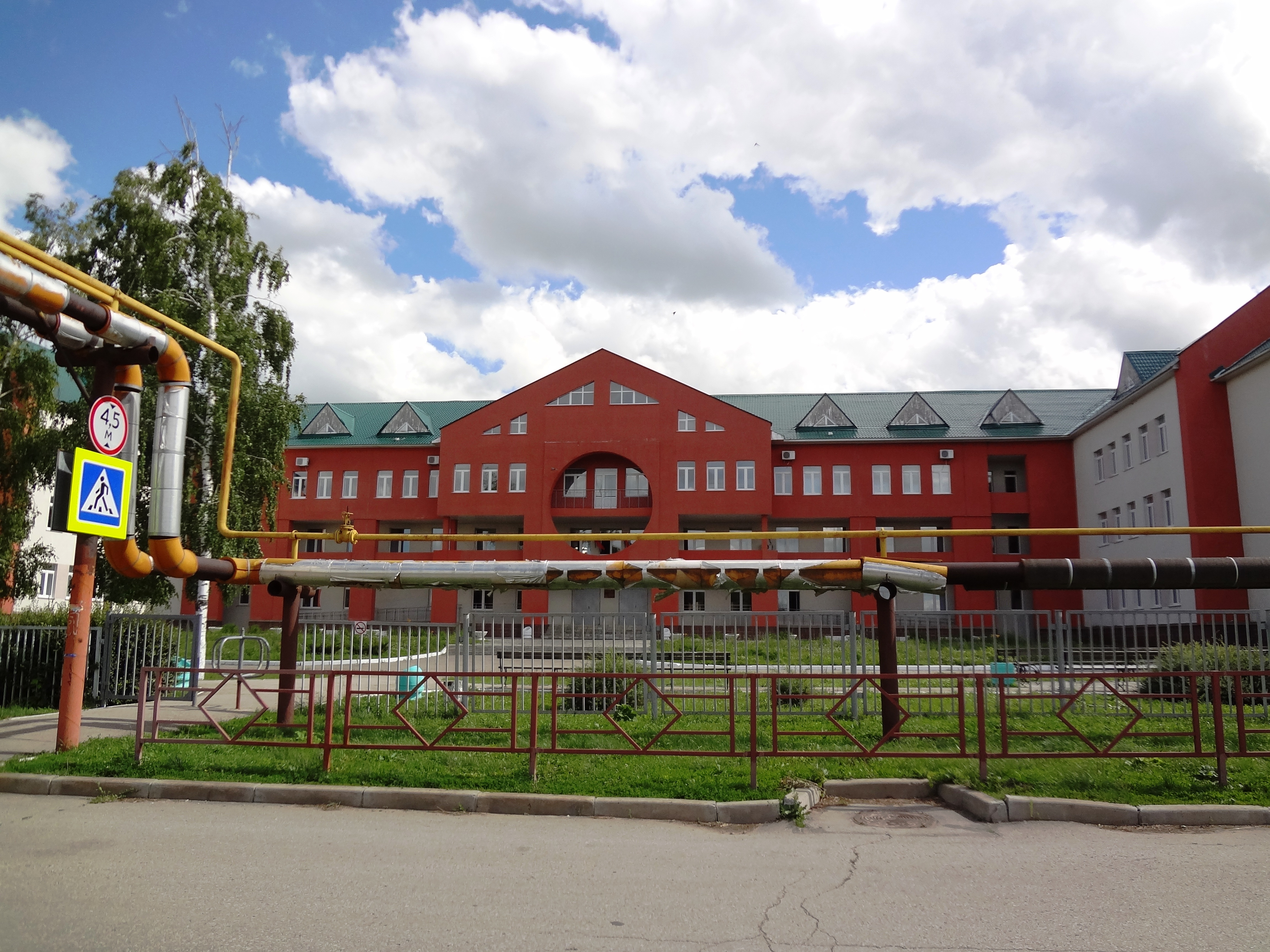 Школа. Поселок Осинки Самарская область